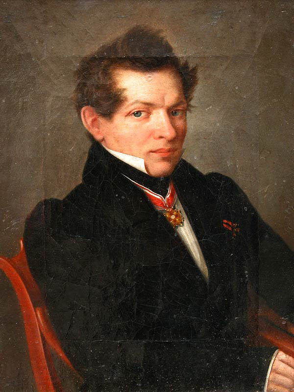 Крюков Л. Д. Портрет Н. И. Лобачевского. Первая половина XIX века. Холст, масло.